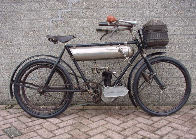 Toestemming van Yesterdays Antique Motorcycles